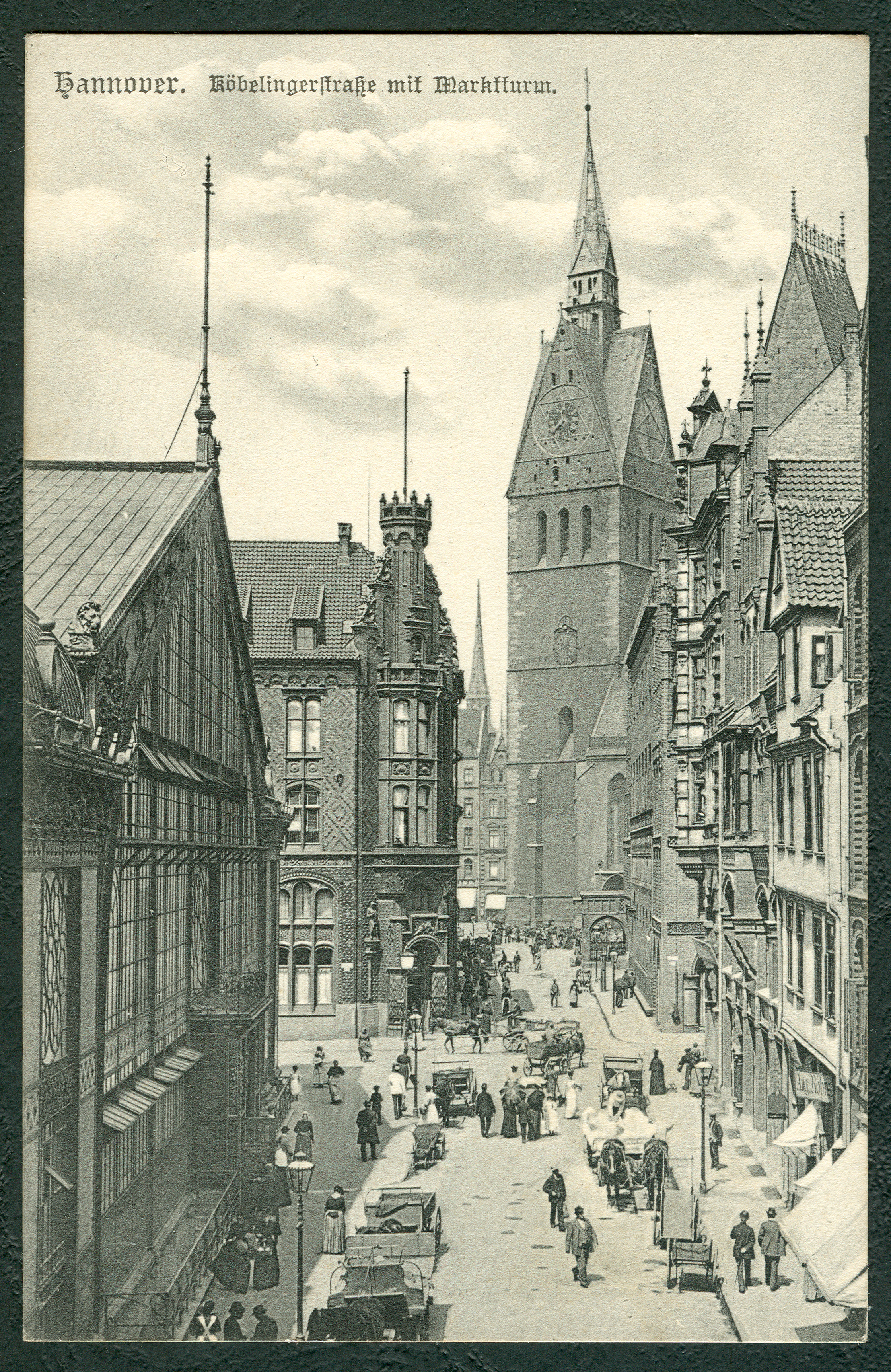 Bildmotiv der Ansichtspostkarte von Karl Friedrich Wunder